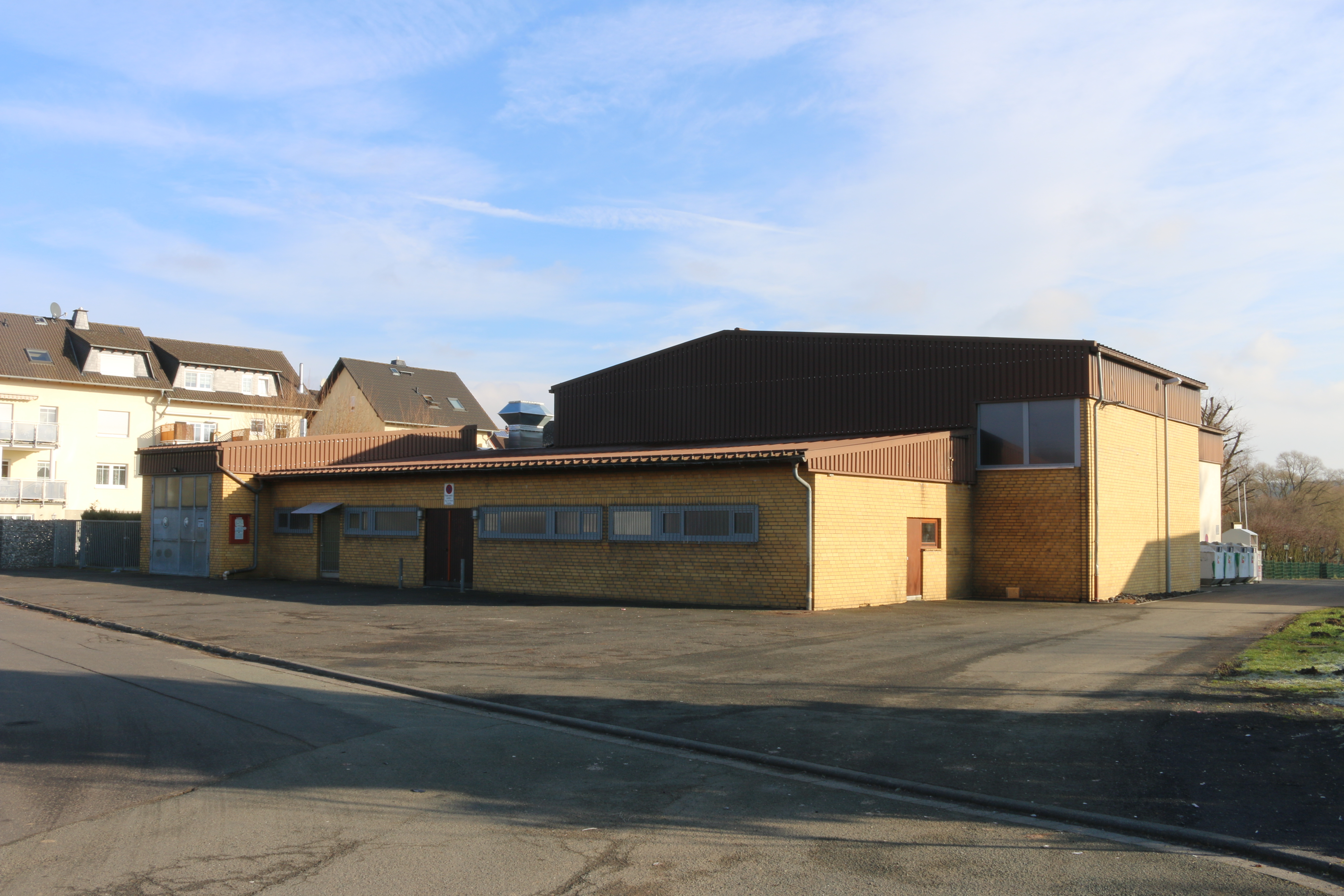 Hintermeilingen: Das Dorfgemeinschaftshaus im Ortszentrum